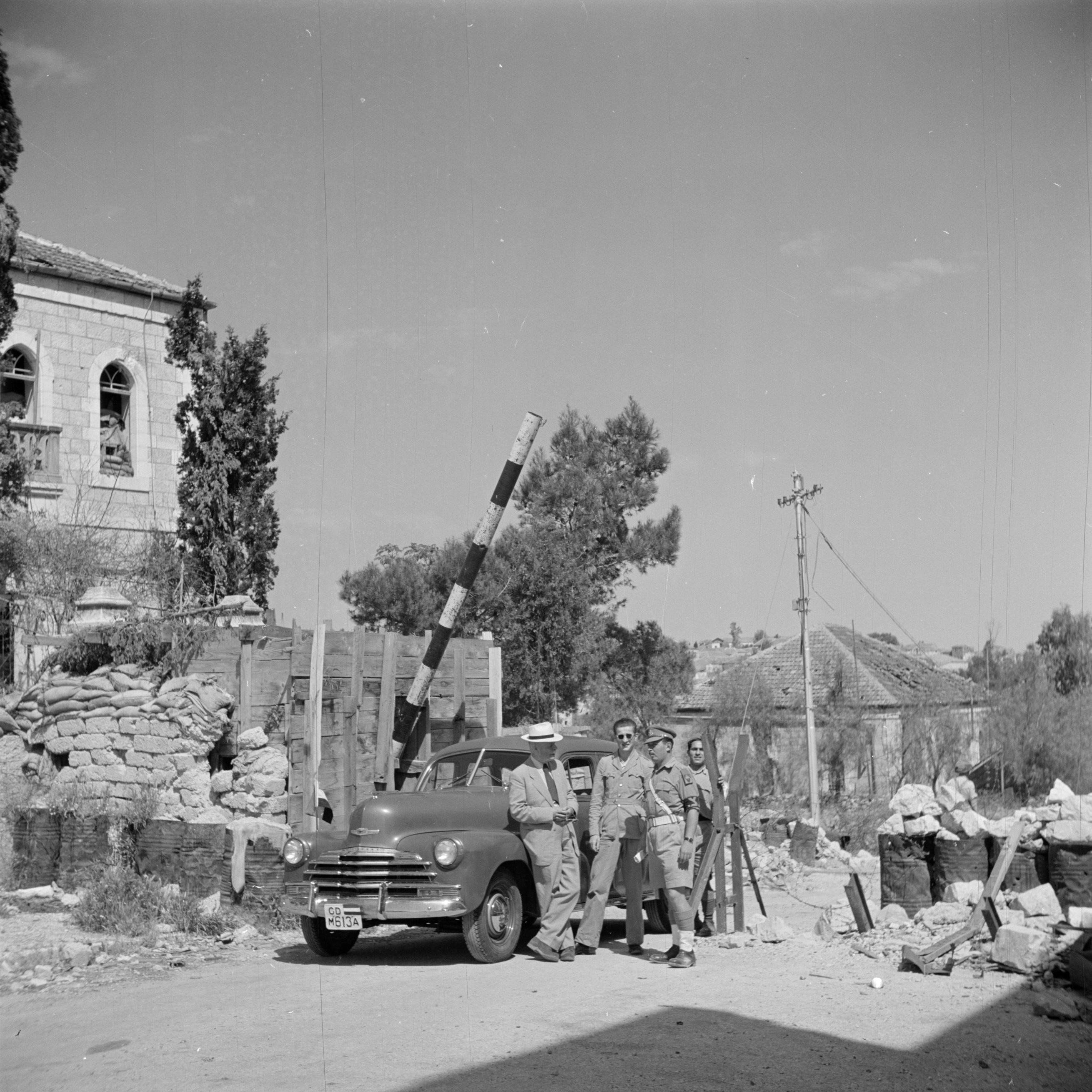 Collectie / Archief : Fotocollectie Van de Poll Reportage / Serie : Israel 1948-1949 Beschrijving : De Nederlandse consul-generaal dr. J.A. Nederbragt in gesprek met grenswachten aan de grens tussen het Arabische en het Israelische deel van Jerzualem bij de Mandelbaumpoort Datum : 1948 Locatie : Israël, Jeruzalem, Mandelbaum, Nederland Trefwoorden : auto's, bomen, diplomaten, grensbewaking, grensovergangen, uniformen Persoonsnaam : Nederbragt, dr. J.A. Fotograaf : Poll, Willem van de, [onbekend] Auteursrechthebbende : Nationaal Archief Materiaalsoort : Negatief (zwart/wit) Nummer archiefinventaris : bekijk toegang 2.24.14.02 Bestanddeelnummer : 255-1622